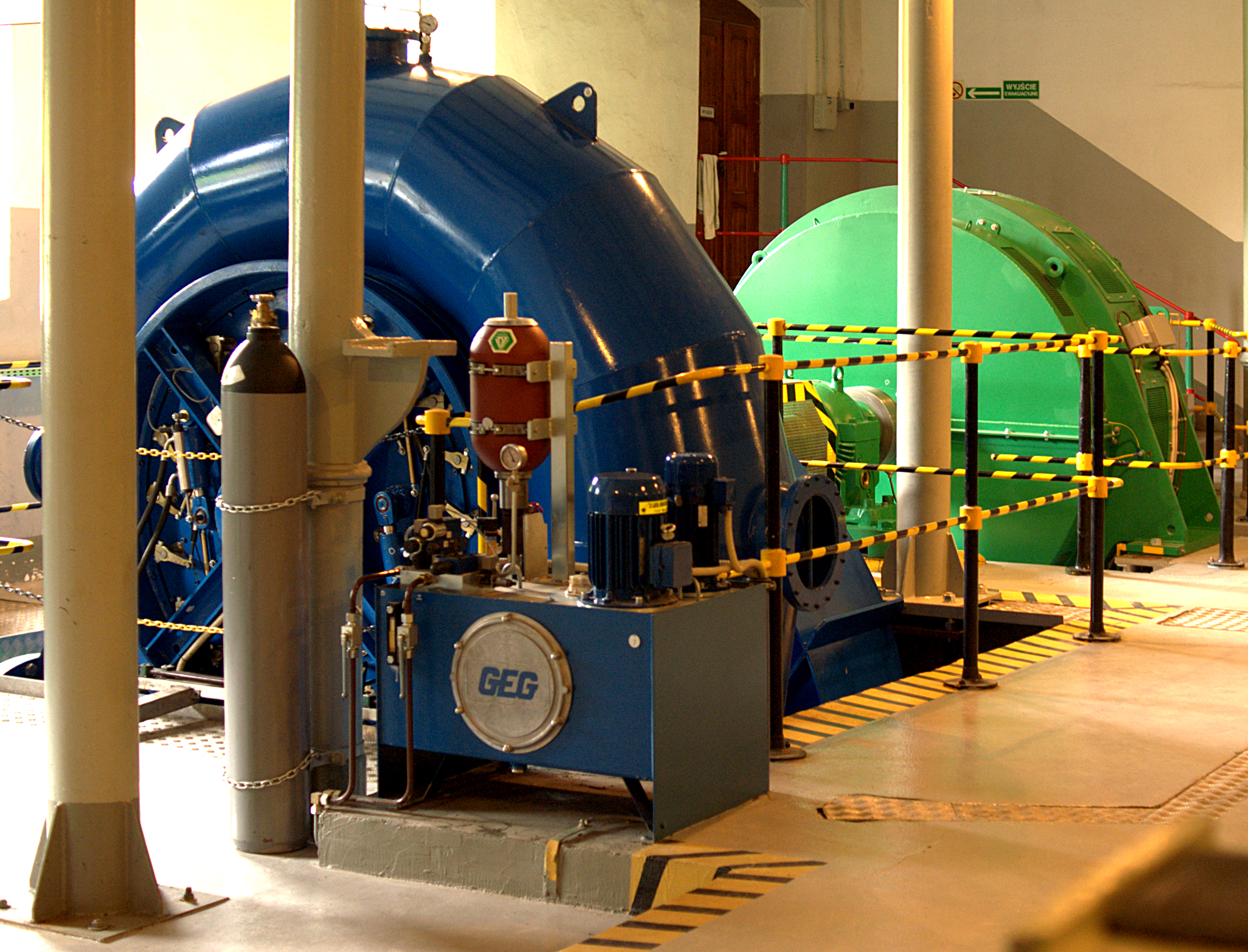 Elktrownia wodna Struga.